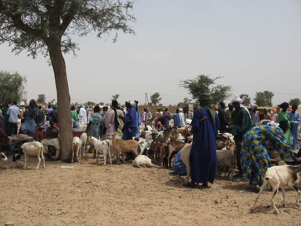 Marché à Touba (Sénégal)